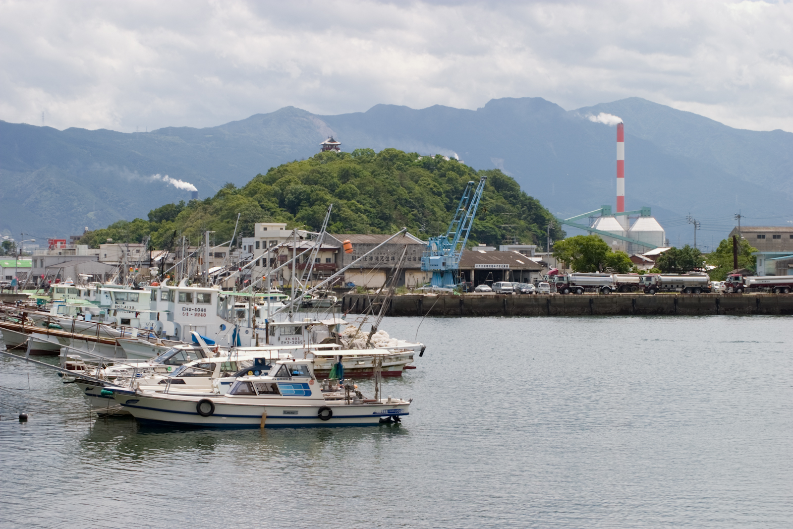 川之江港付近